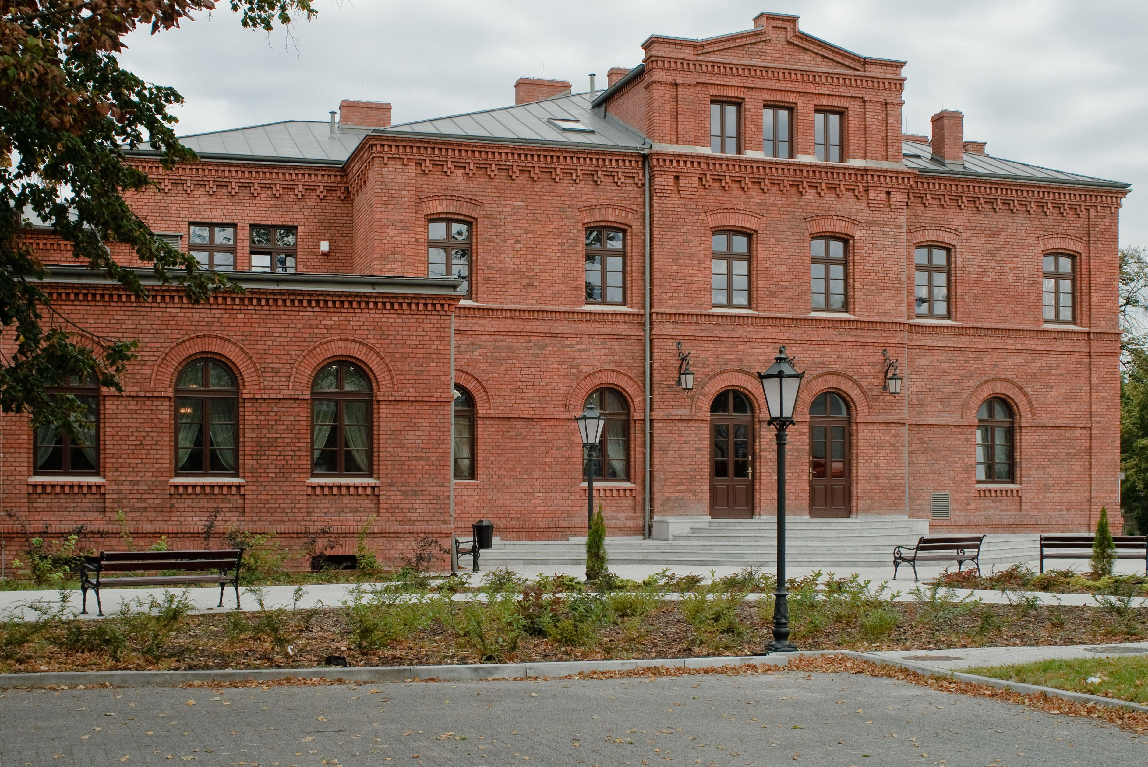 Resursa w Żyrardowie, ul. 1 Maja 45, 1885, 1905. (zabytek nr rejestr. 1110)